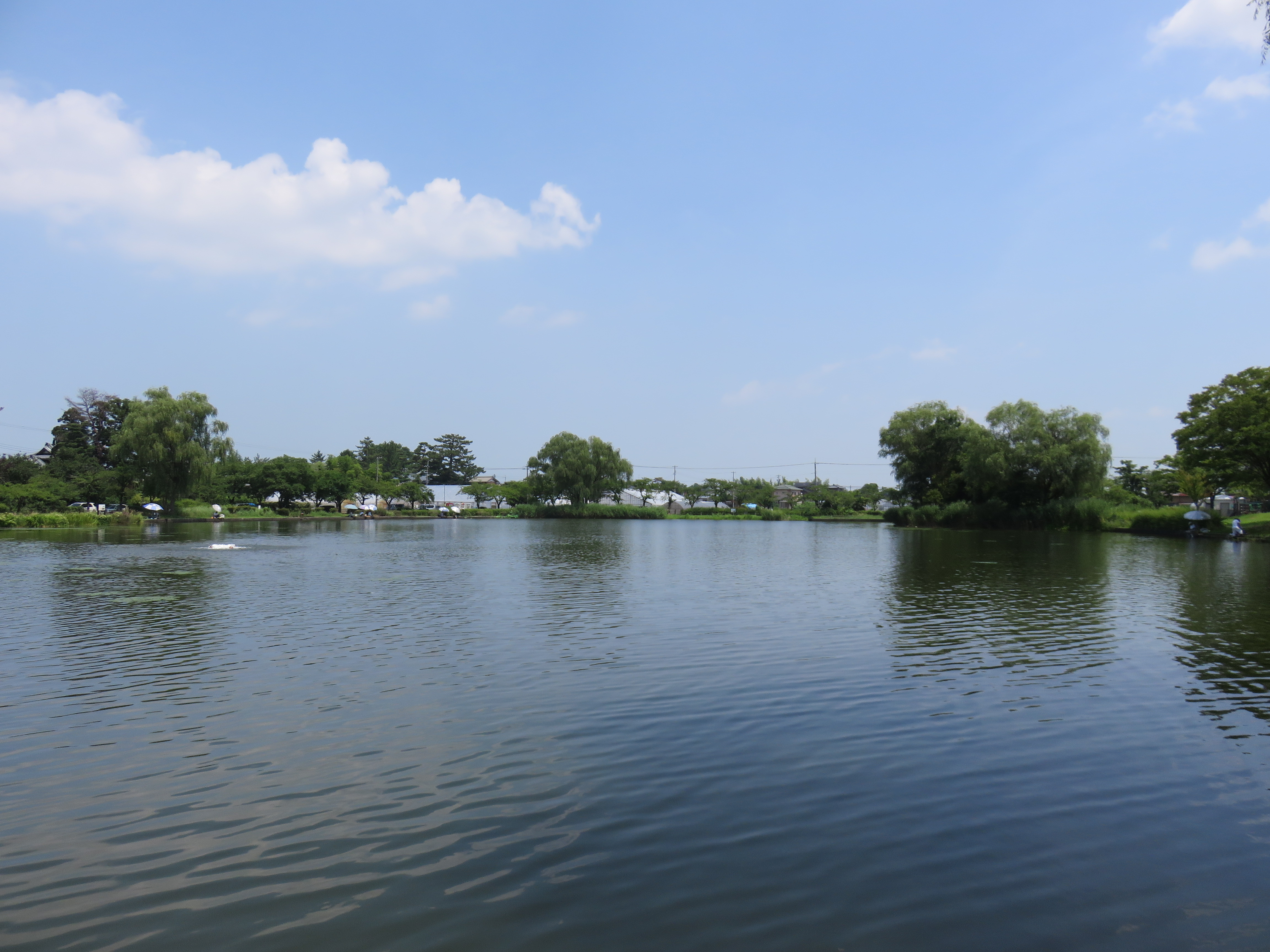 北山池 新潟市江南区